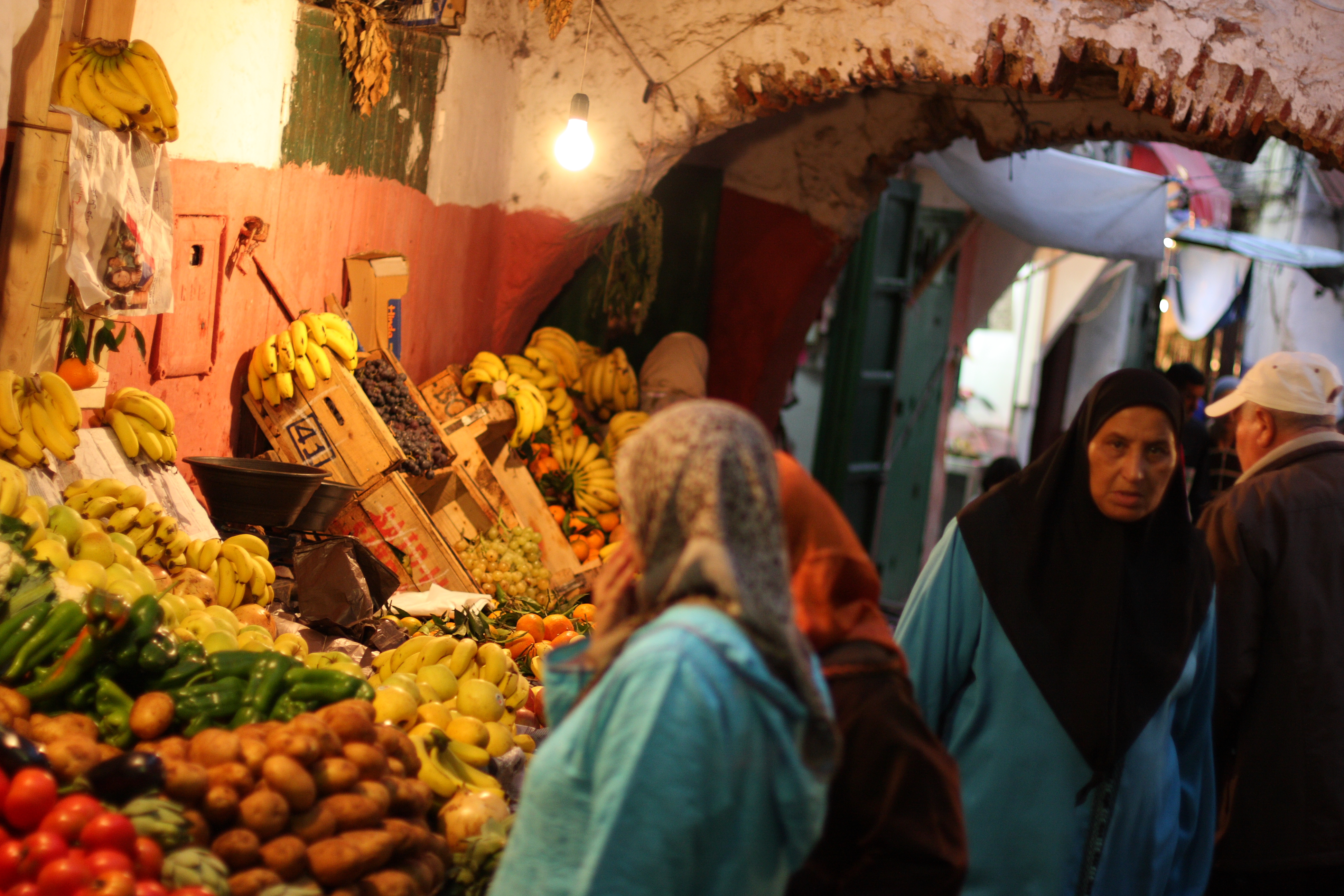 Tetouan, Morocco